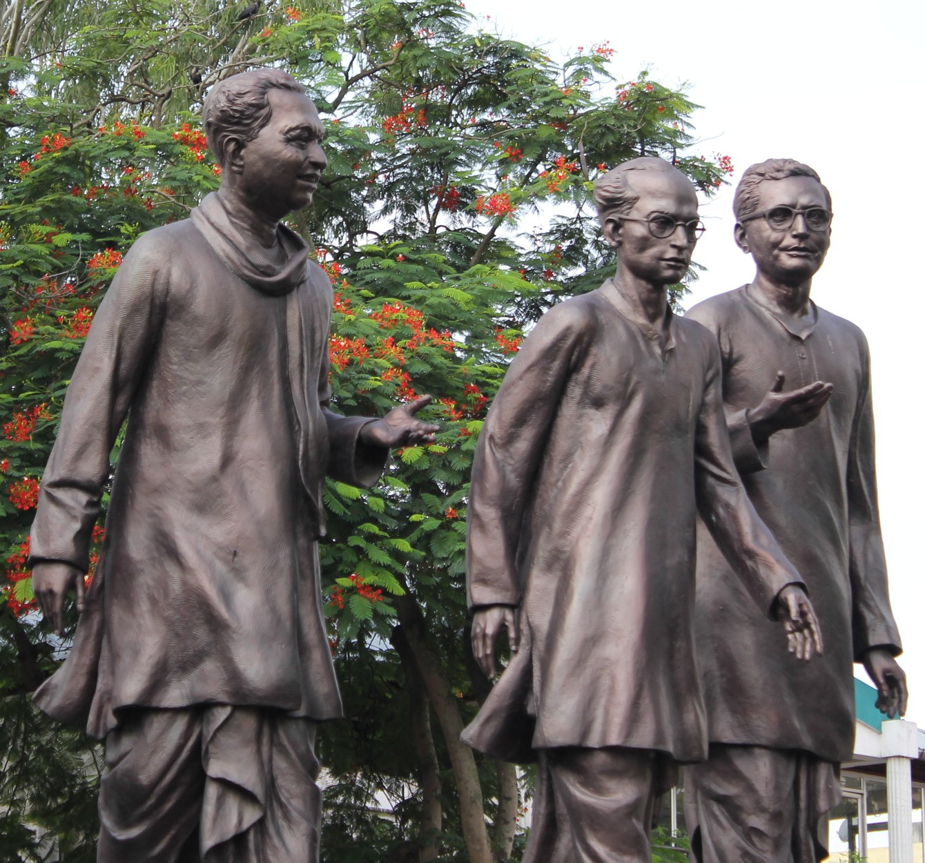 অসমীয়া: কলাগুৰু, ৰূপকোঁৱৰ আৰূ নটসূর্য্যৰ পূর্নাবয়ব মূর্তি।স্থান গুৱাহাটী জিলা পুঁথিভৰাল।